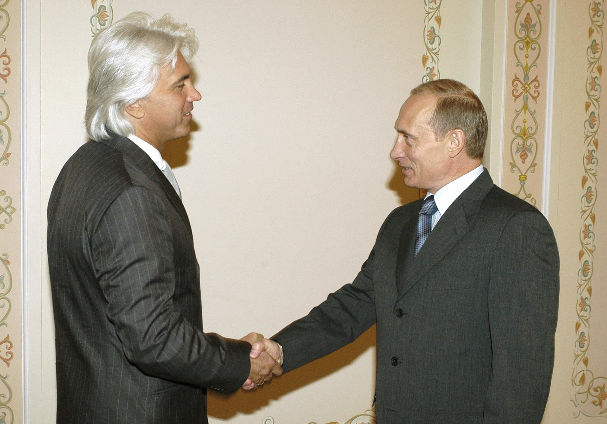 Встреча Президента России Владимира Путина с оперным певцом Дмитрием Хворостовским в подмосковной резиденции Ново-Огарево